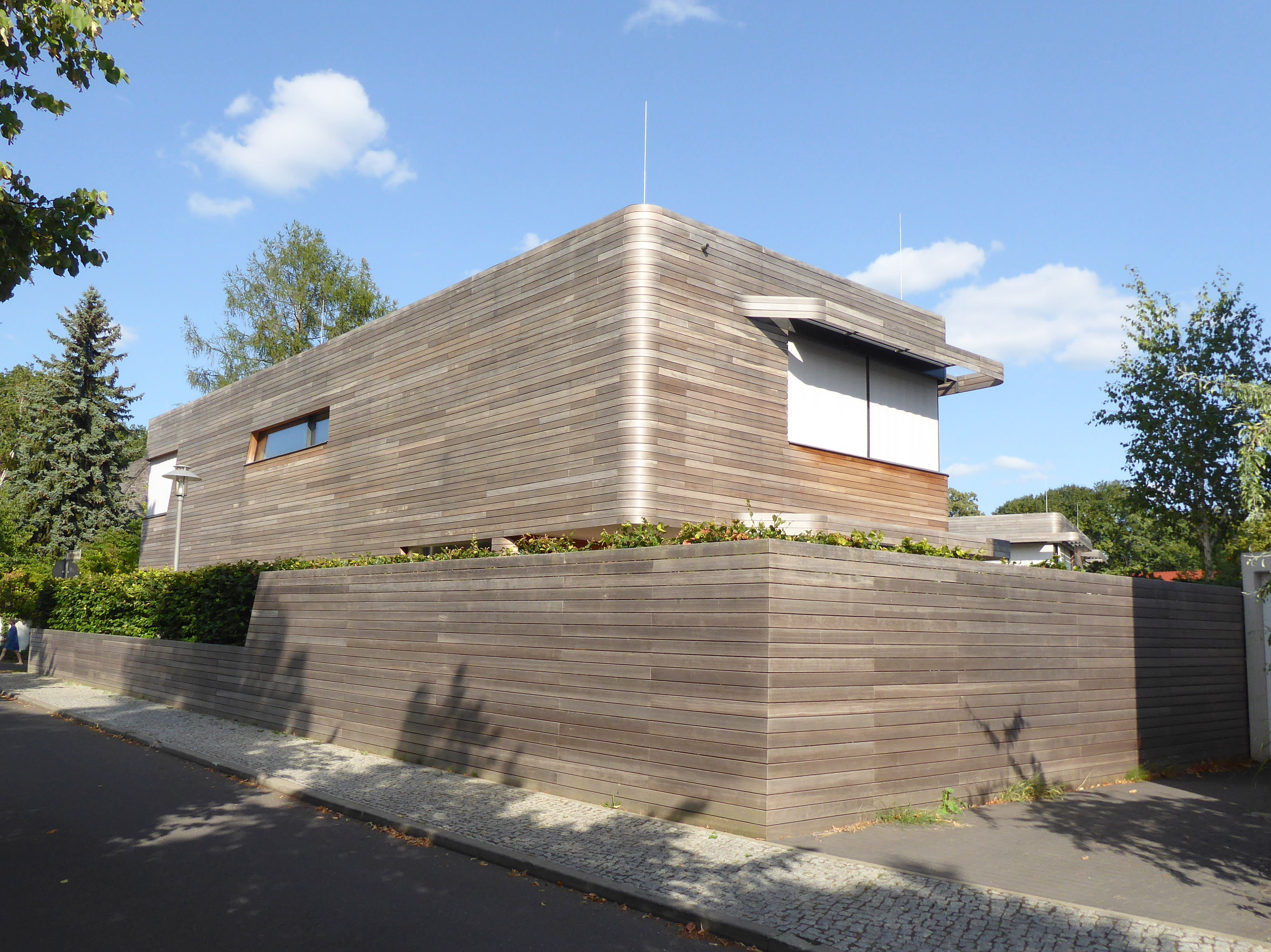 Wannsee Max-Liebermann-Allee GRAFT holistc living (ganzheitliches Leben)